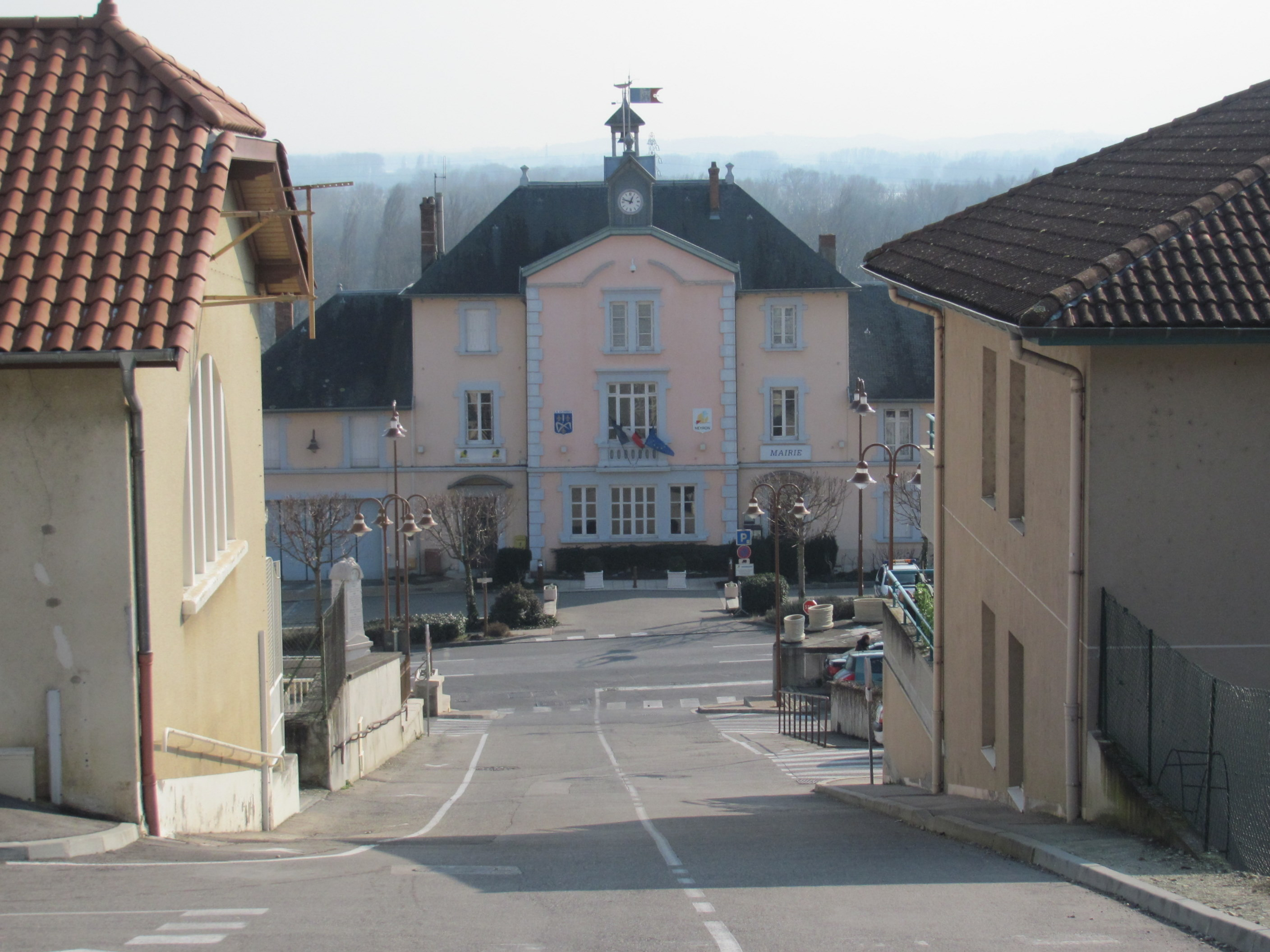 Vue de la mairie de Neyron.